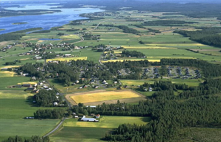 Motiv: Avan-Unbyn (delen i Överluleå sn) Nyckelord: Flygbilder, Riksintressen Kategori: Jordbruksby Avan-Unbyn (delen i Överluleå sn)